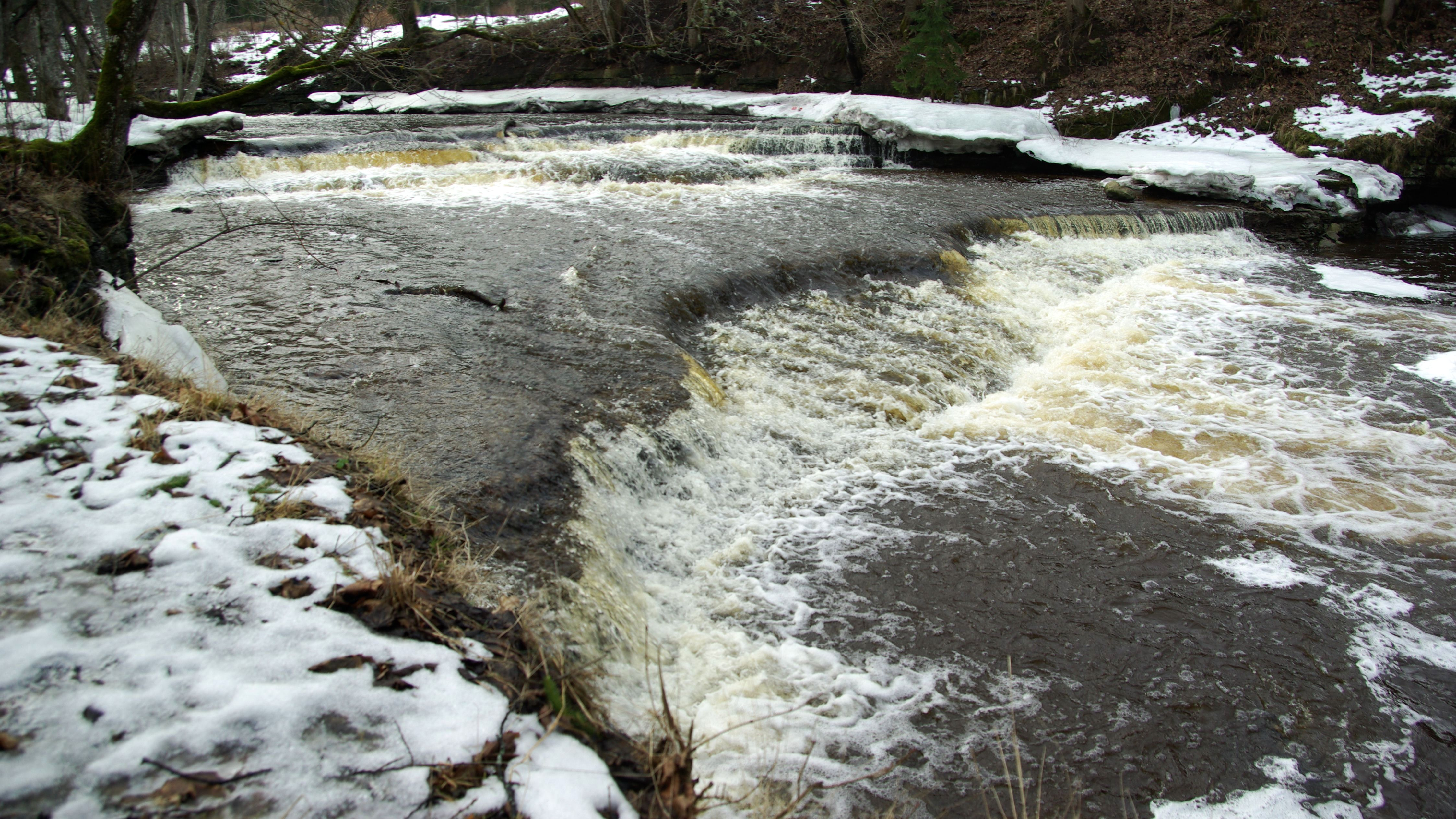 Joaveski joastik asub Harju ja Lääne-Viru maakonna piirimail Joaveski külas.Joastik toitub Loobu jõest.